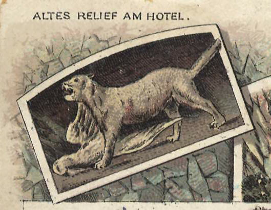 Relief am Hotel Waldkater, Ausschnitt aus einer Ansichtskarte, die 1897 gelaufen ist